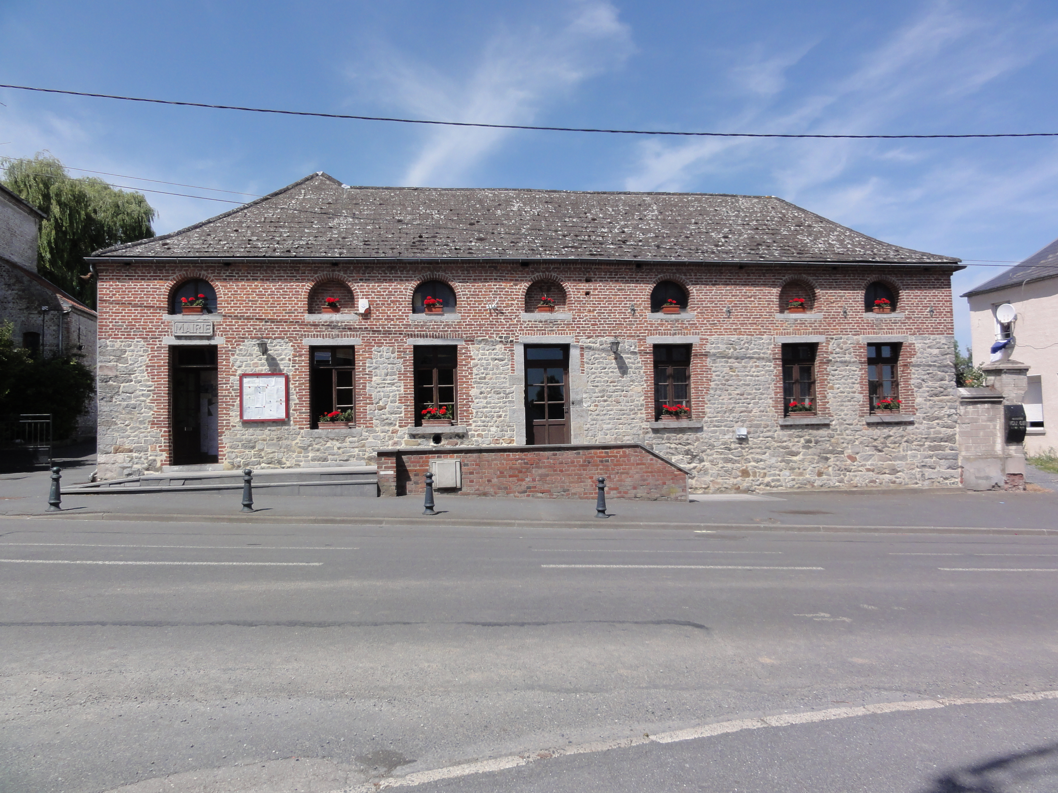 Houdain-lez-Bavay (Nord, Fr) mairie, école des filles This building is indexed in the Base Mérimée, a database of architectural heritage maintained by the French Ministry of Culture, under the references IA59000657 and type .